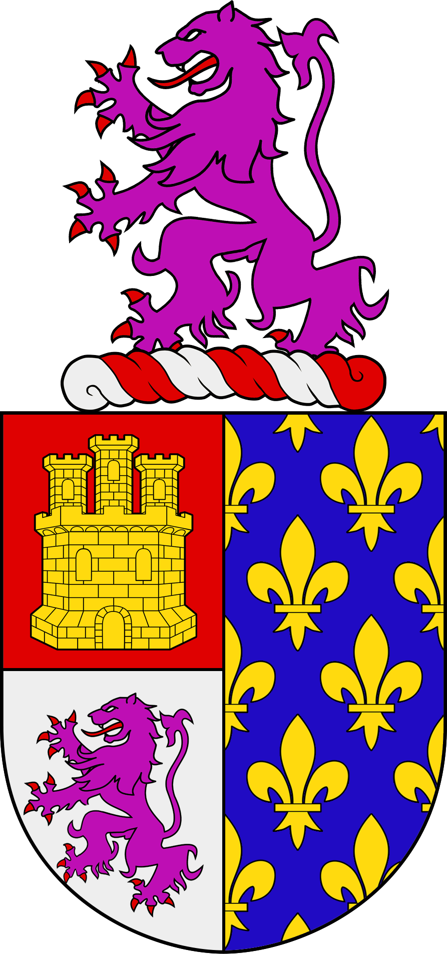 Partido: o primeiro de vermelho com um castelo de ouro (Castela), cortado de prata, com um leão de púrpura, armado e lampassado de vermelho (Leão); o segundo de azul, semeado de flores-de-lis de ouro (França). Timbre: o leão do escudo.